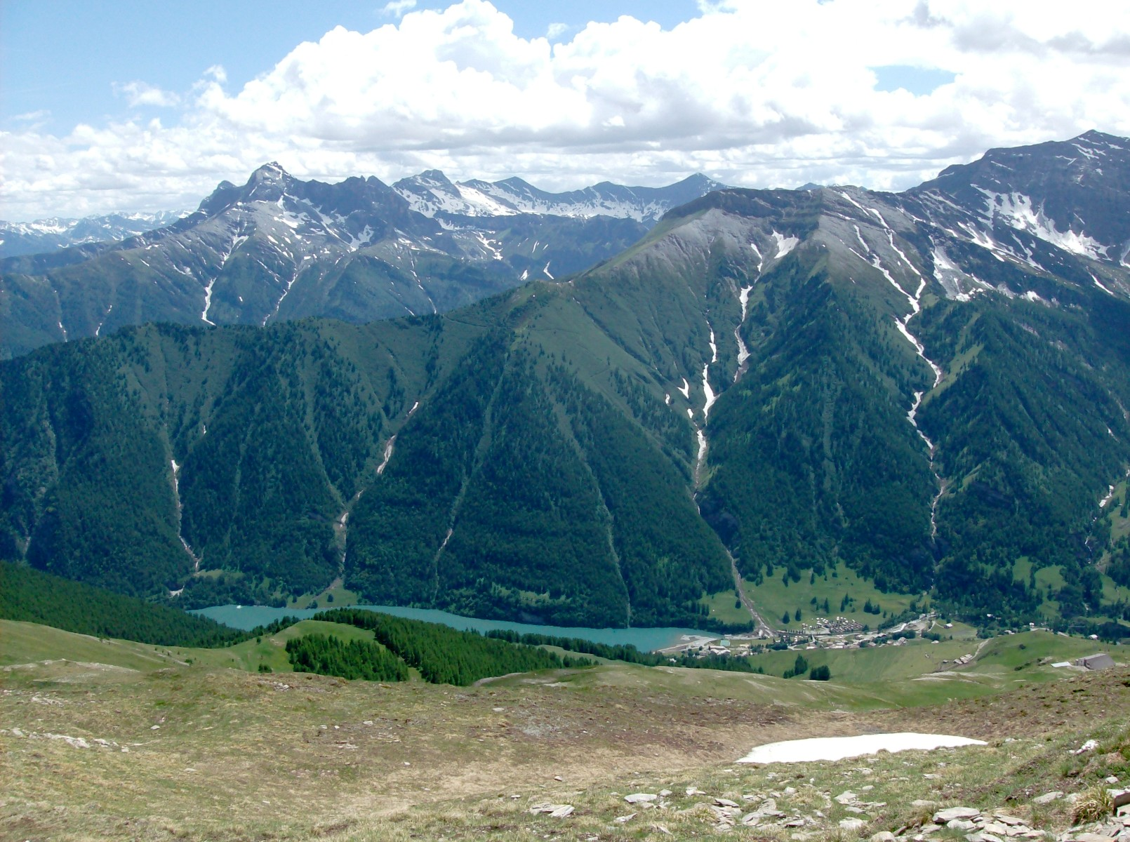 Alta valle Varaita: la frazione capoluogo di Pontechianale vista dalla località le Conce, sullo spartiacque tra vallone di Vallanta e valle Varaita di Chianale